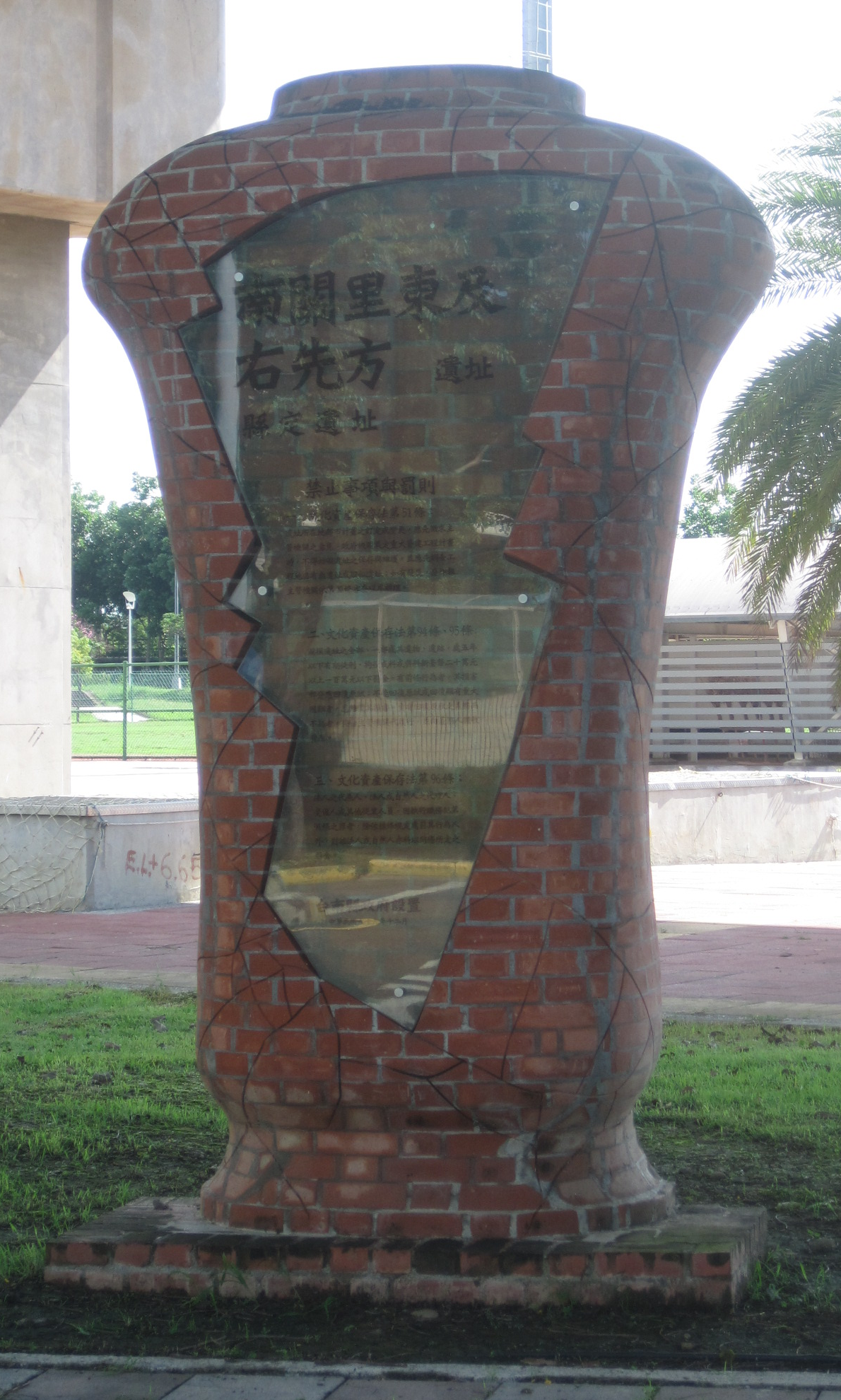 南關里東及右先方遺址意象